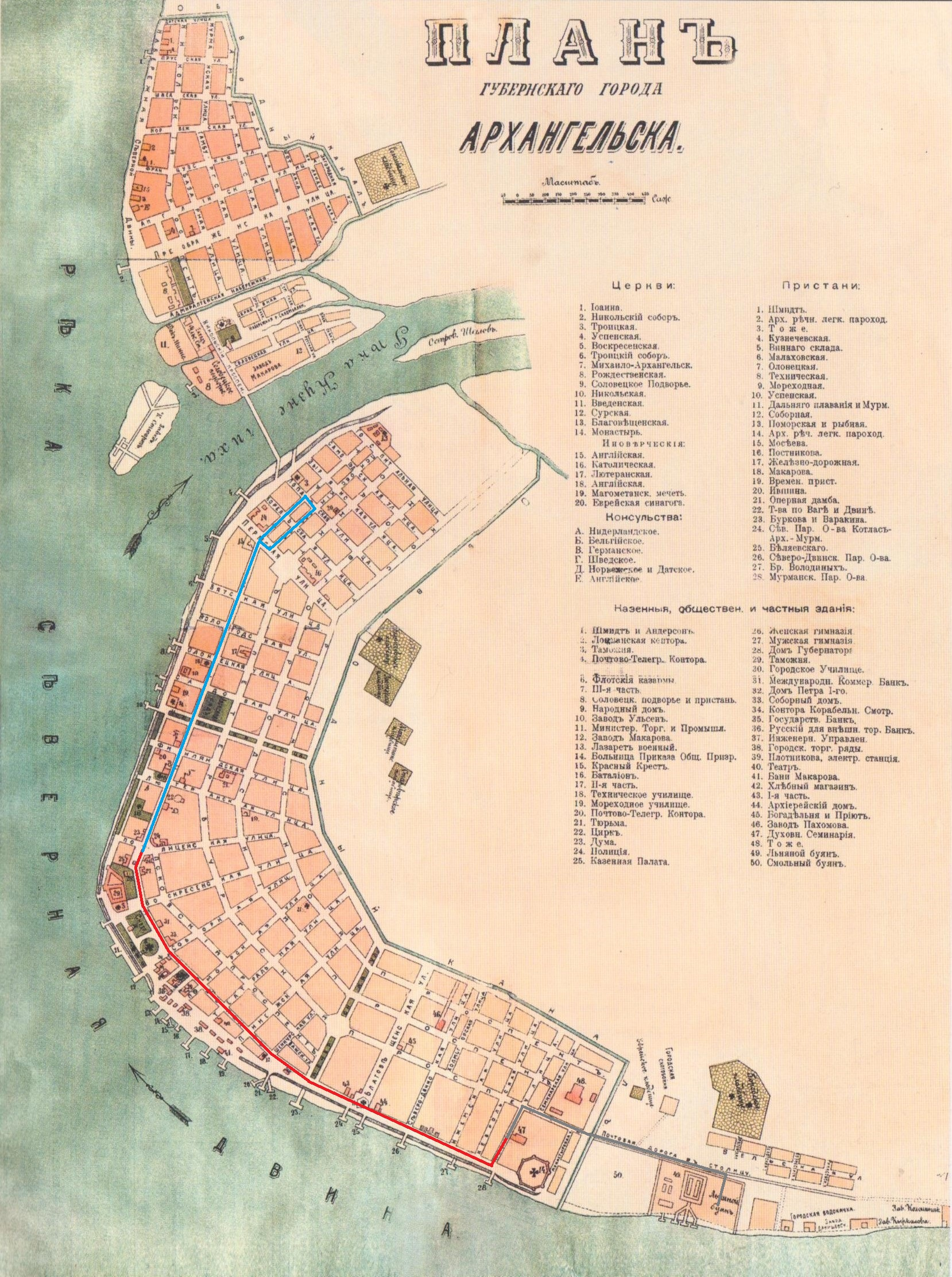 Трамвайная сеть в Архангельске в 1916 г. Маршрут № 1 - красный, маршрут № 2 - голубой, пути в депо - серый